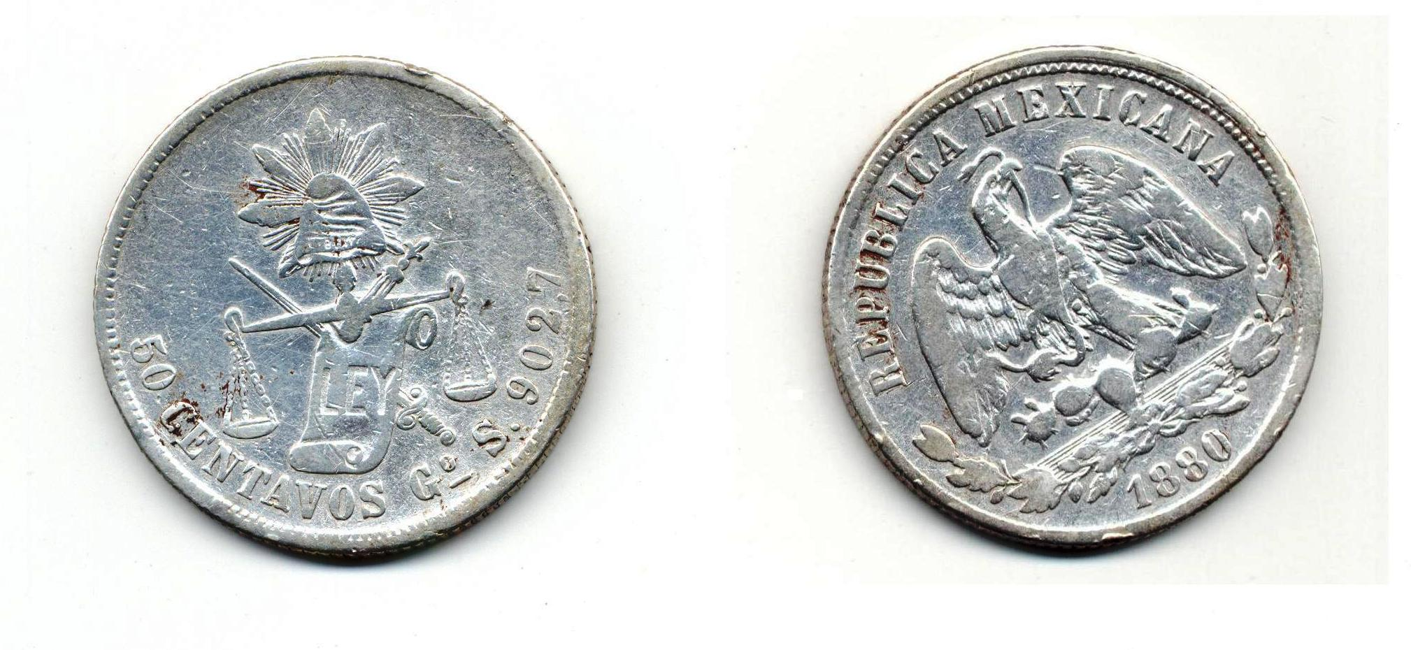 Moneda de 50 centavos acuñada en la ceca de Guanajuato en 1880.